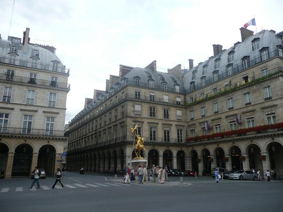 Place des Pyramides, Paris